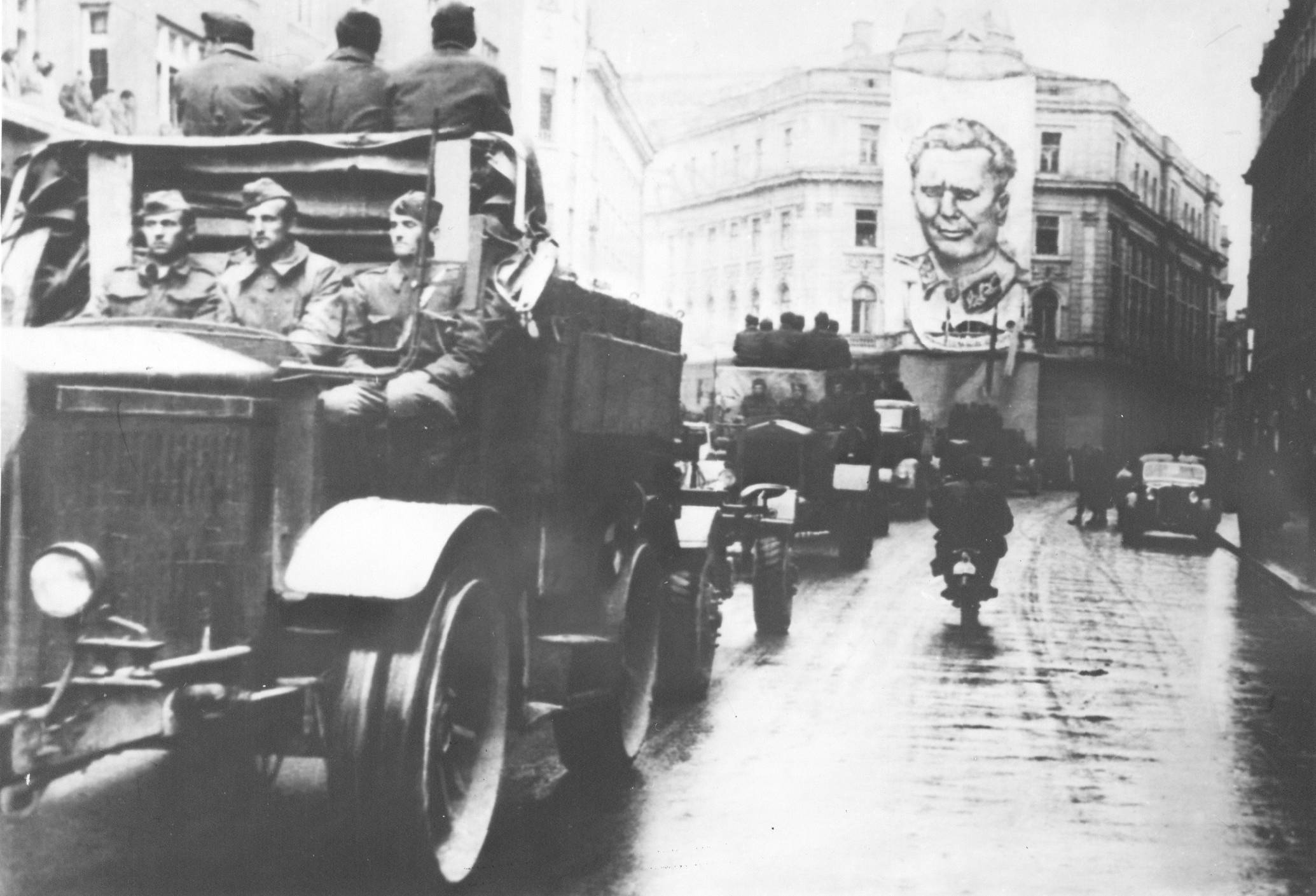 I mezzi motorizzati del V Korpus partigiano entrano a Sarajevo; sullo sfondo il ritratto di Josip Broz Tito